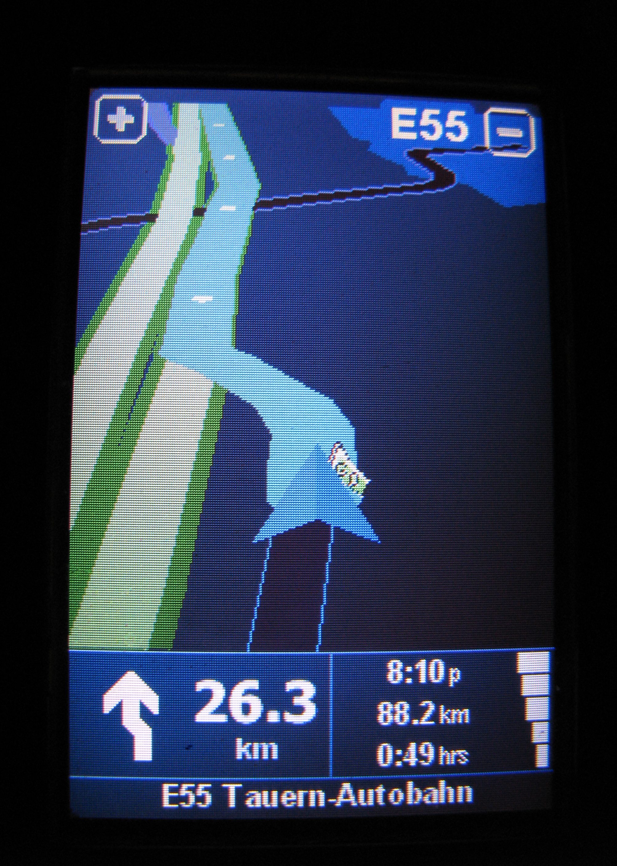 ТомТом навигација на мобилном телефону. Ночна графика.